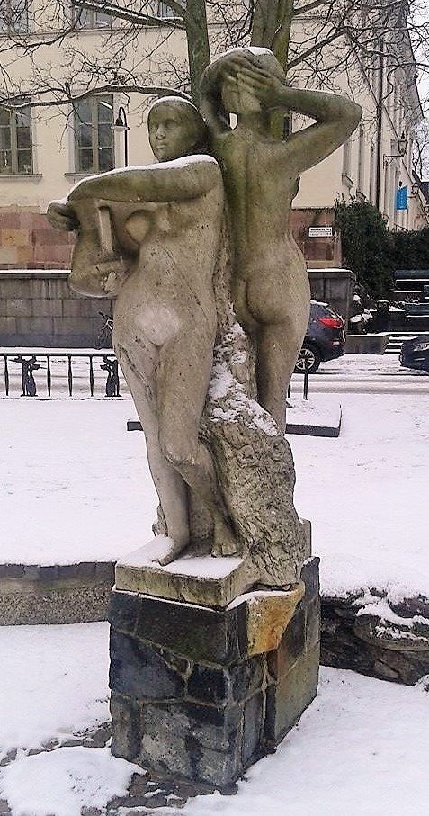 Systrarna på Mosebacke torg